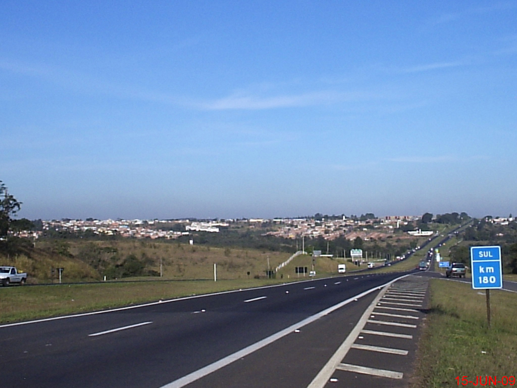 Cidade de Rio Claro vista da Rodovia Washington Luís - SP-310 Km-180 (Sentido Sul)